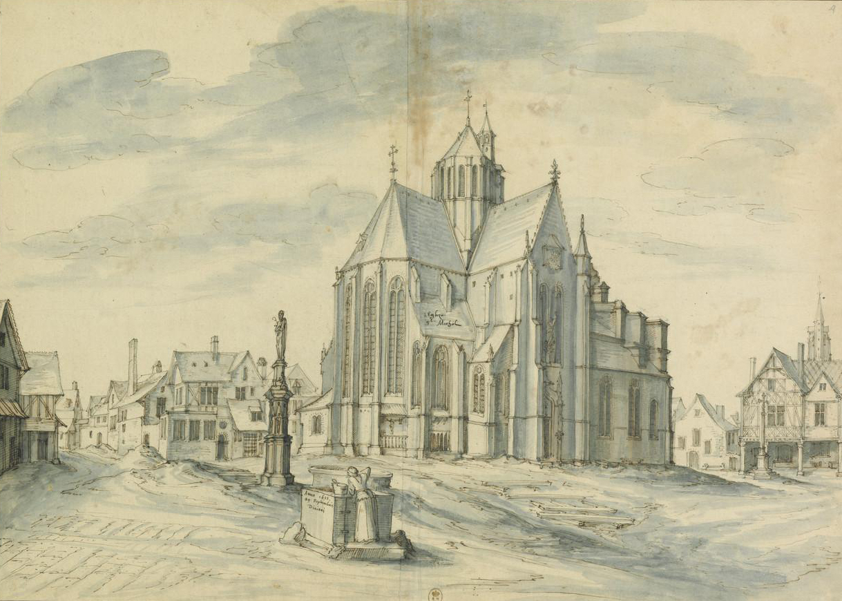 Vue de l’Église Saint Michel de Dijon, le 29 Septembre 1615, dessin plume et encre brune, lavis bleu d’Étienne Martellange (1569-1641).